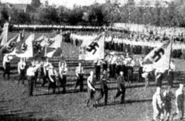 Desfile nazista em Porto Alegre no 1º de maio, Dia do Trabalho.